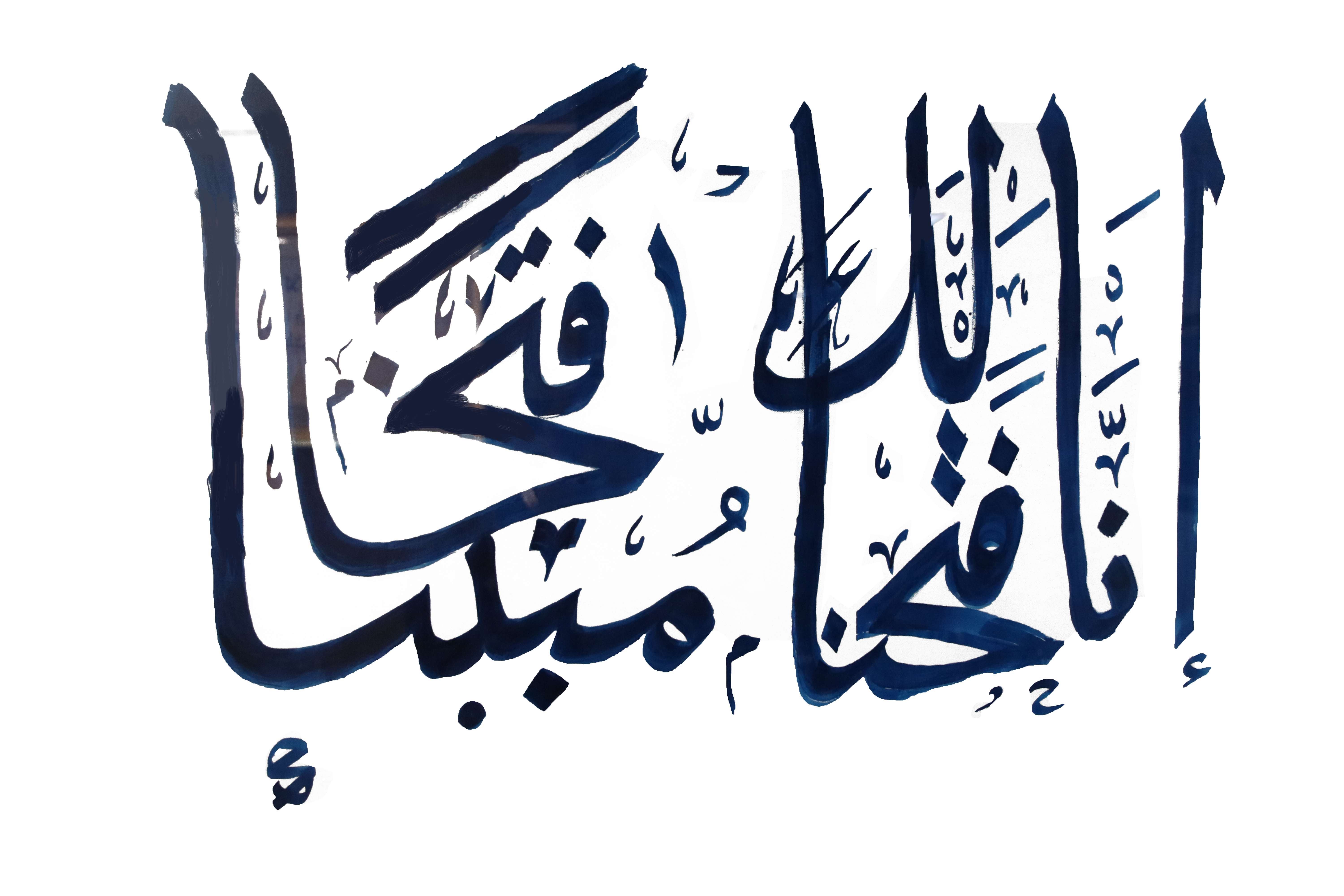 الخط العربي - الشيخ محمد بن فيصل القاسمي